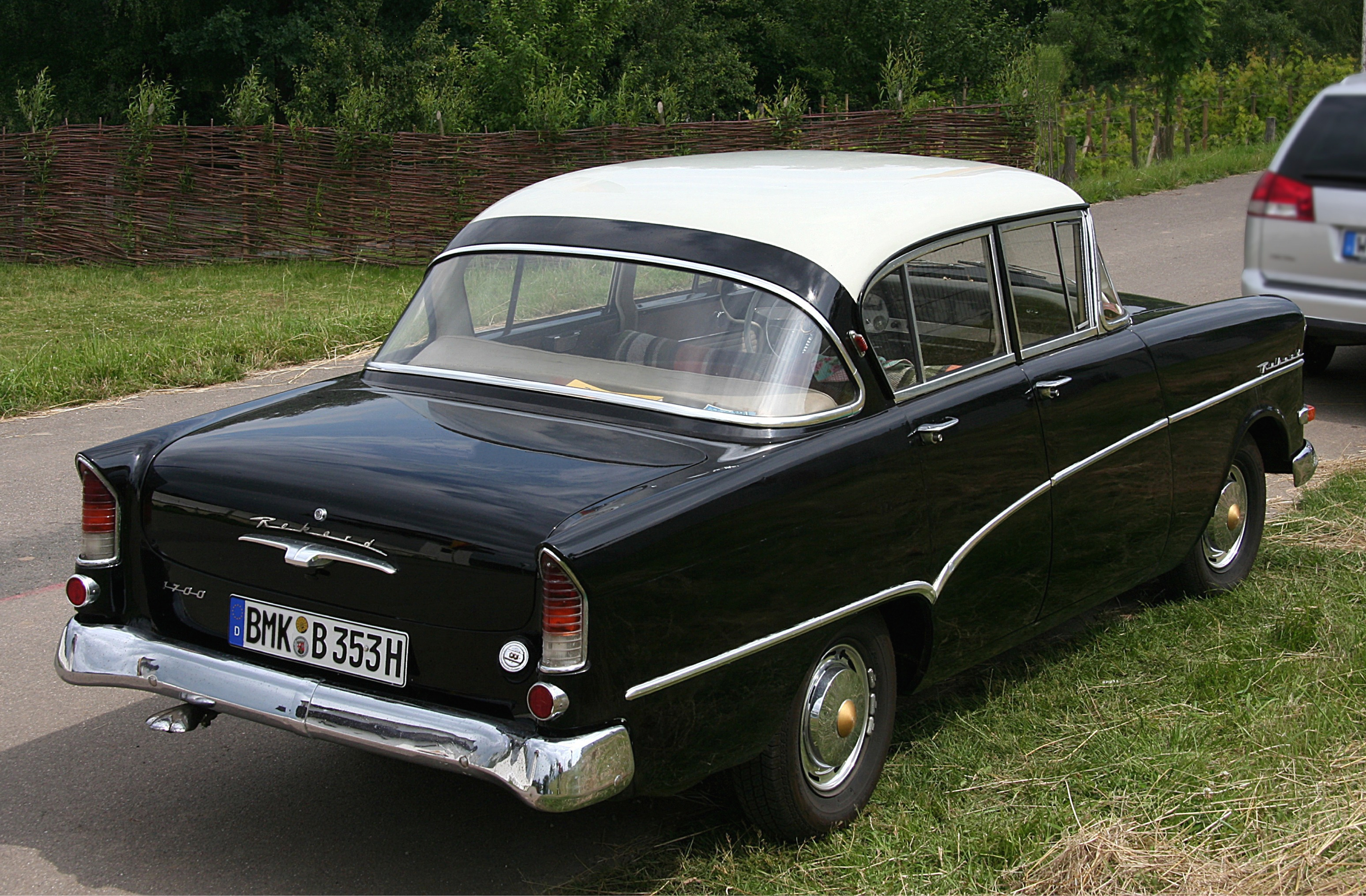 Opel Rekord 1700 – P1 (Kennzeichen verändert)